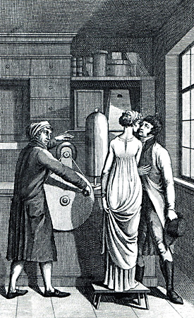 Georg Matthias Bose (1710–1761) bei der Vorführung einer elektrostatischen Entladung. Bose (links im Bild) lädt eine auf einem Isolierschemel stehende Frau mit Hilfe einer Elektrisiermaschine elektrostatisch auf. Kurz bevor sie die Lippen des rechts von ihr stehenden Mannes berührt, entlädt sich die Elektrizität in einem Funken. Vorführungen dieser Art waren im 18. Jahrhundert ein beliebtes Mittel, das Publikum durch Naturphänomene zu belustigen und in Erstaunen zu versetzen.